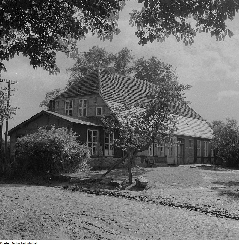 Original image description from the Deutsche FotothekAnkershagen. Heinrich-Schliemann-Museum